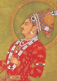 Abhai Singh